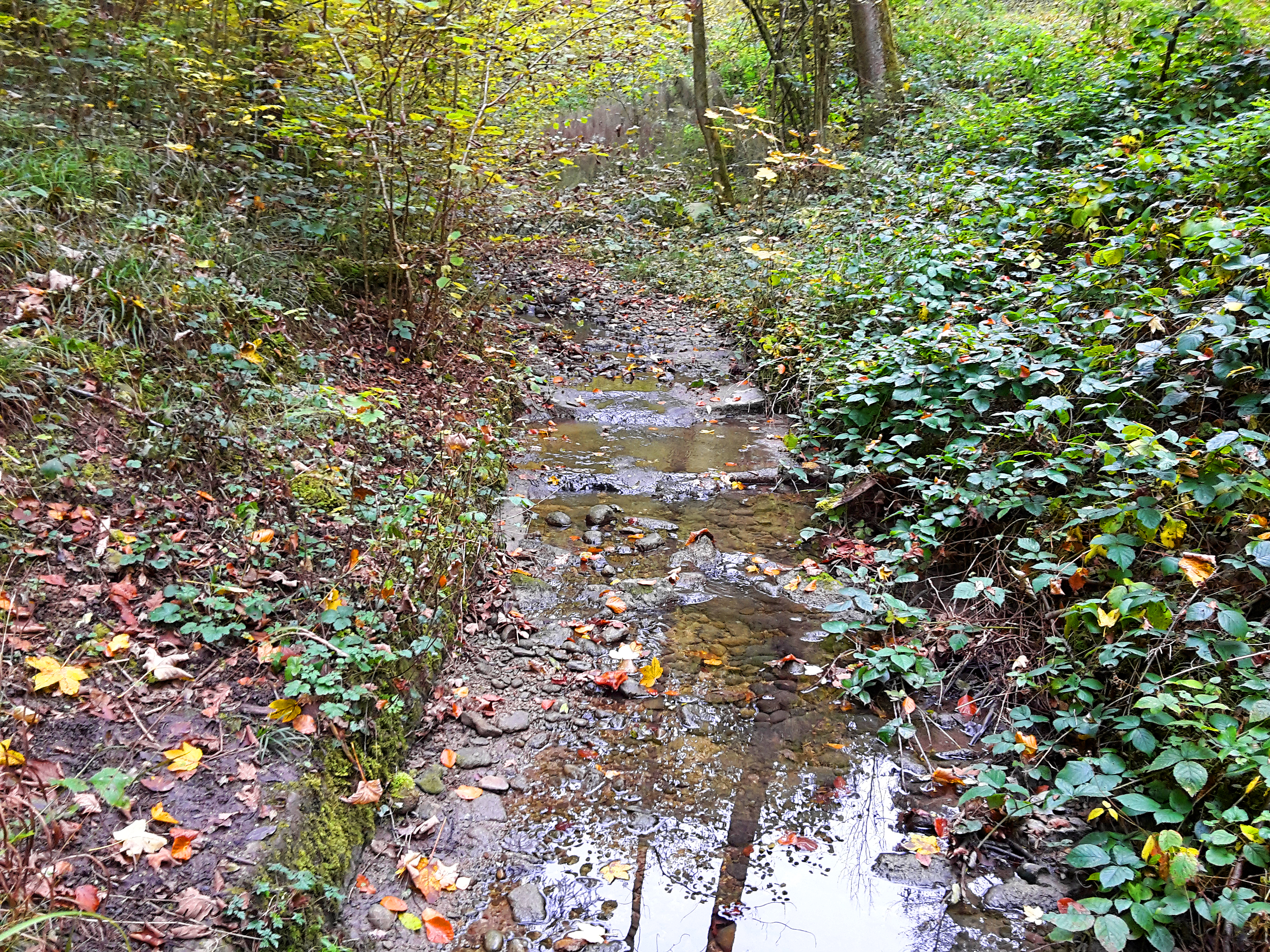 Holderbach im mittleren Teil des Tobels am Hönggerberg; Blick auf einen kurzen kanalisierten Abschnitt